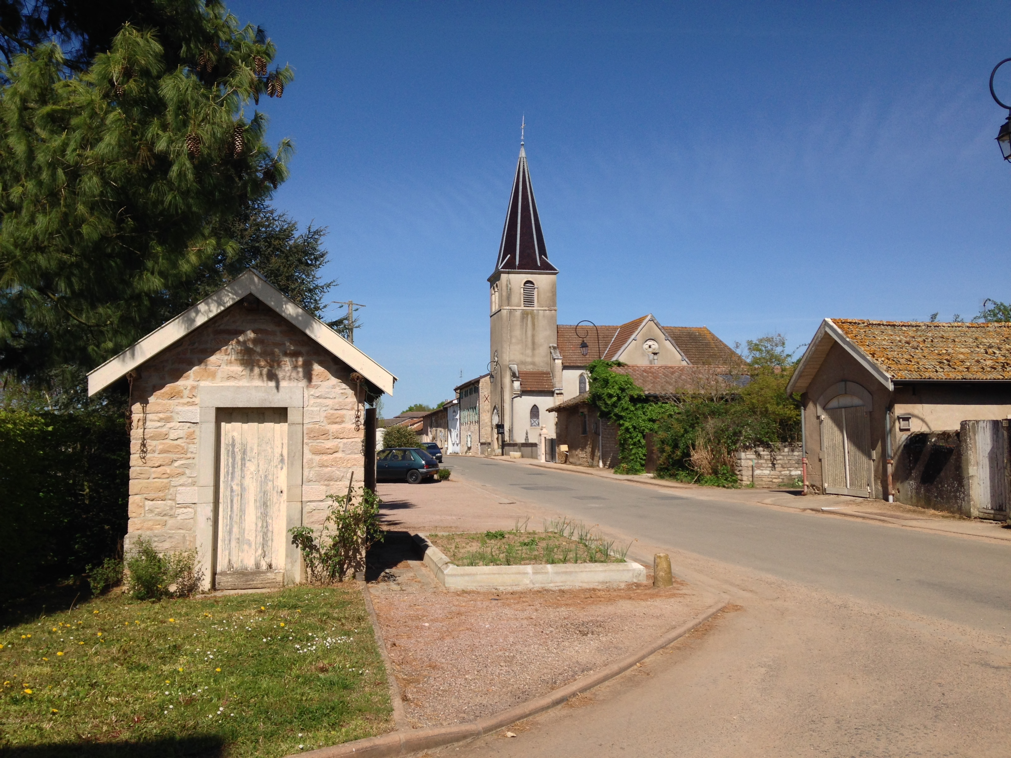 Rue principale du village avec vue sur l'église